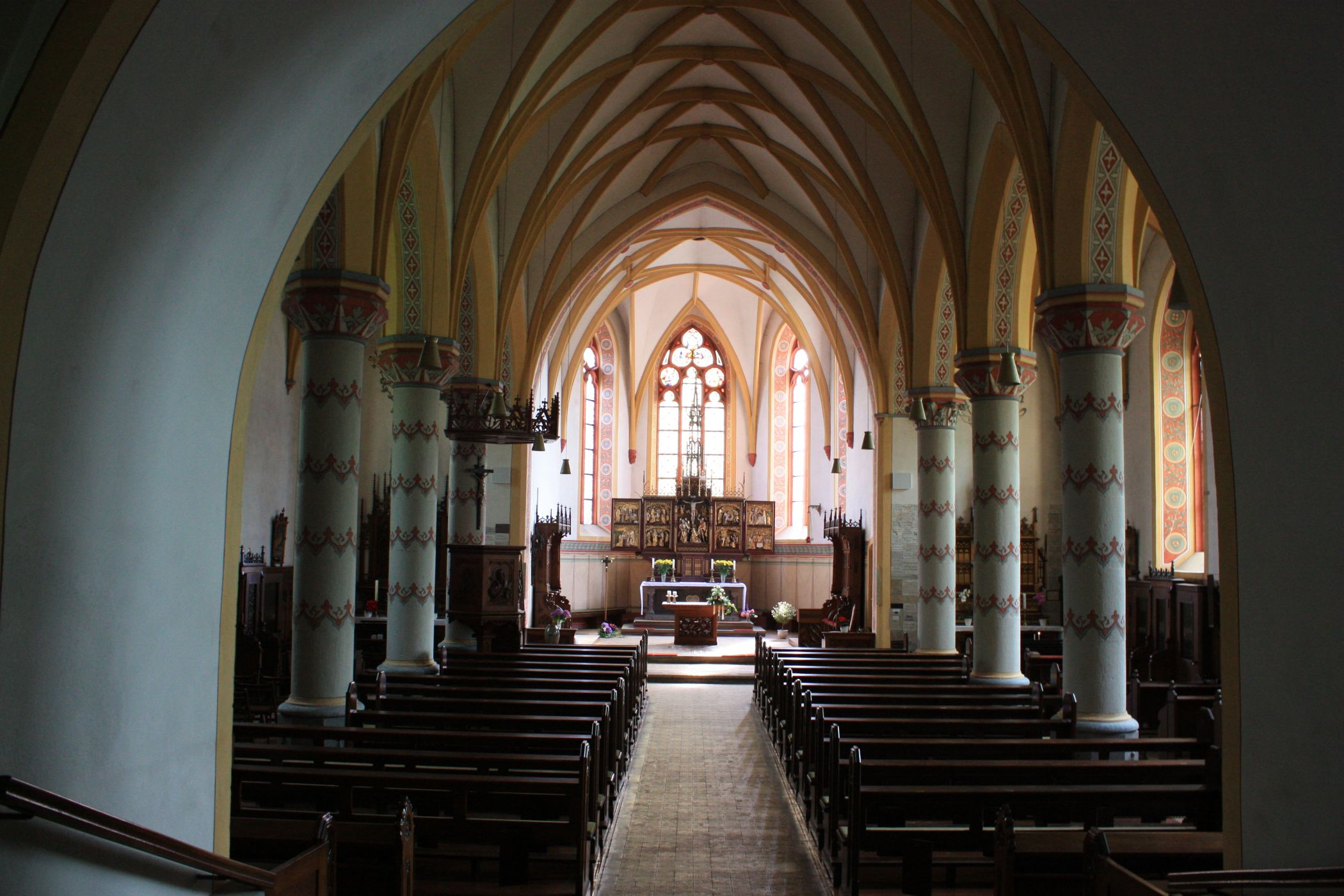 Innenansicht der Liebfrauenkirche in Westerburg (erbaut 1898)